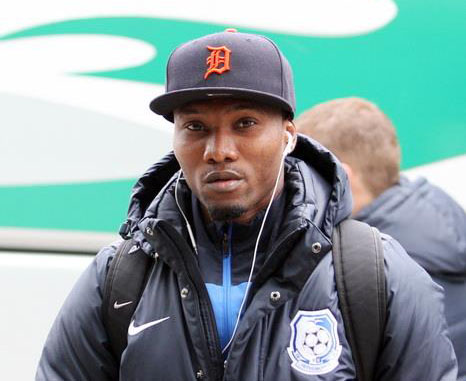 Франк Джа Джедже 24 листопада 2013 року перед грою з полтавською Ворсклою.